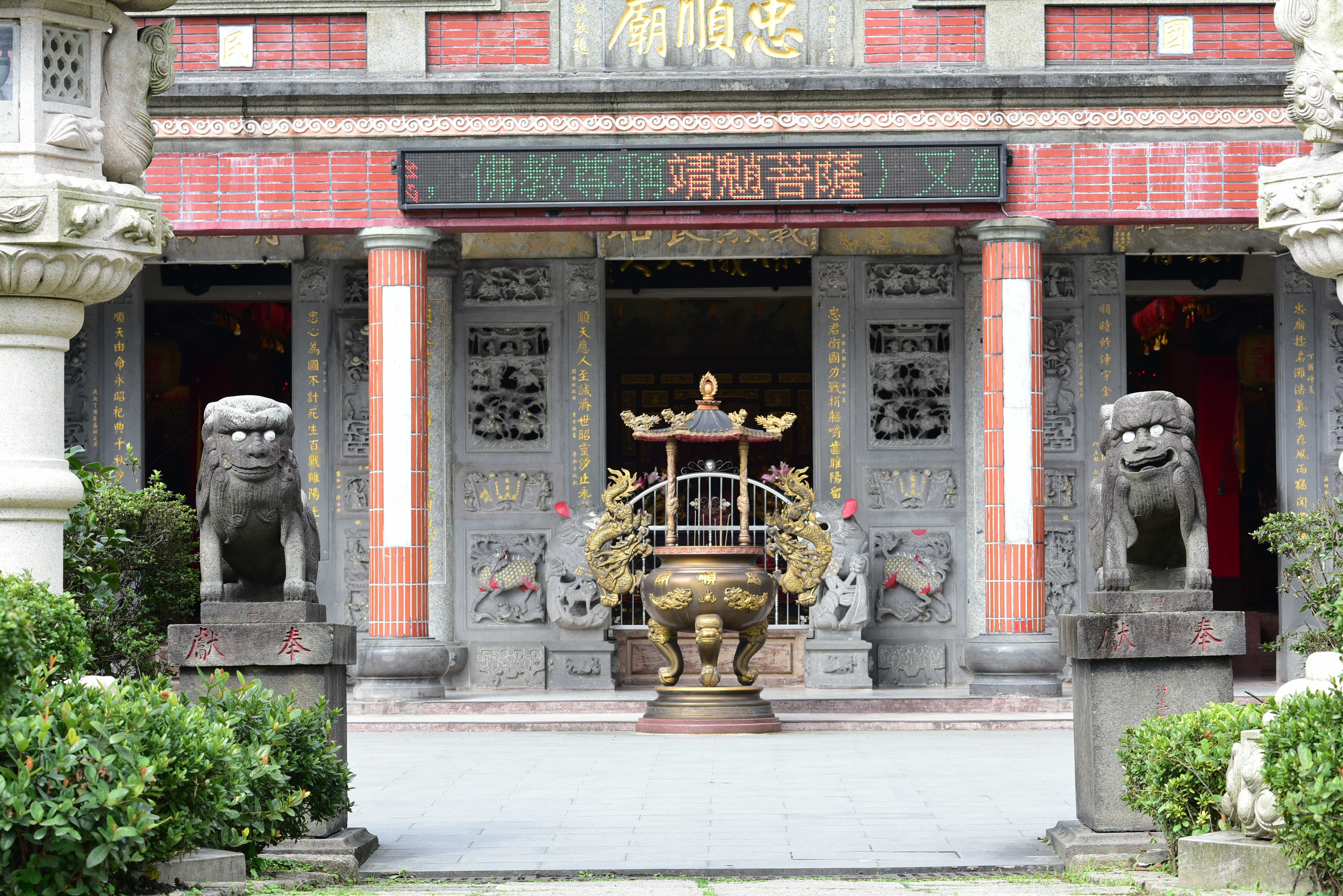 2018 Xizhi Shrine Komainu阿形&吽形